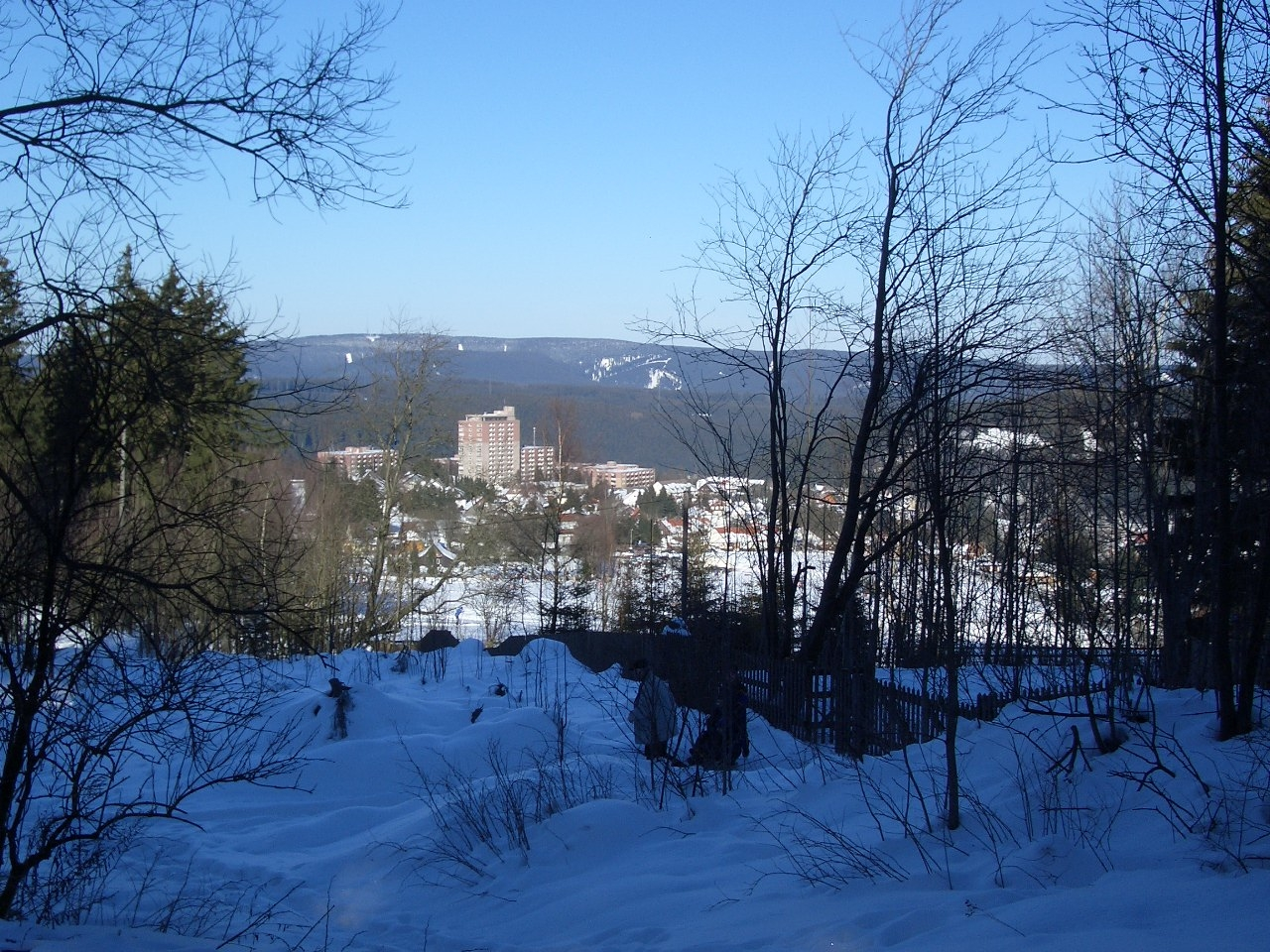 Altenau